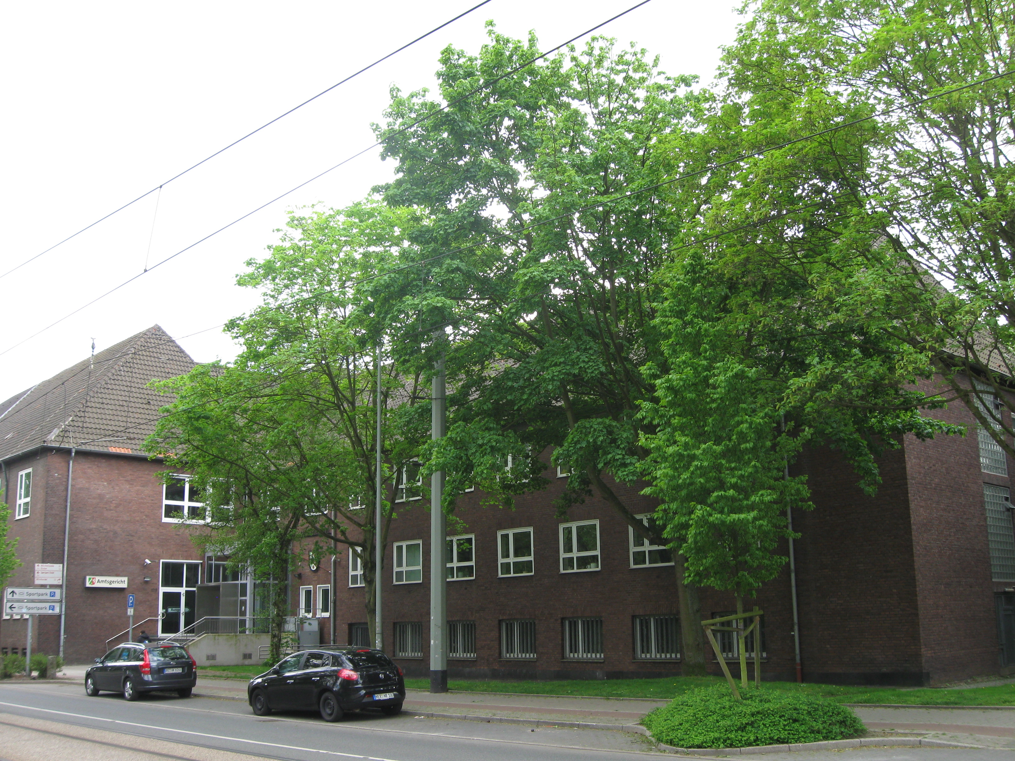 Amtsgericht Herne-Wanne (Hauptstraße 129, 44651 Herne)